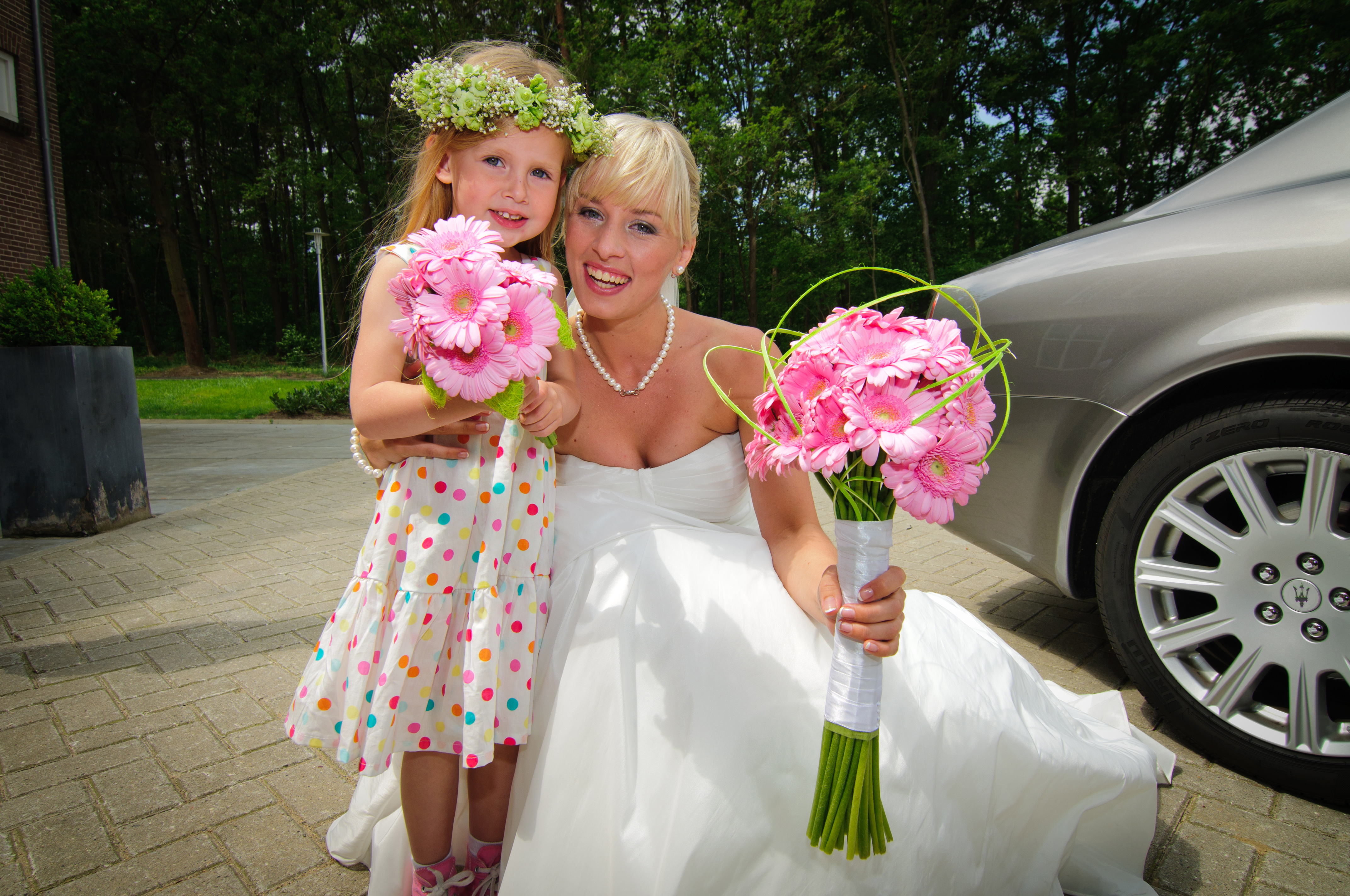 Tokina 11-16 2.8